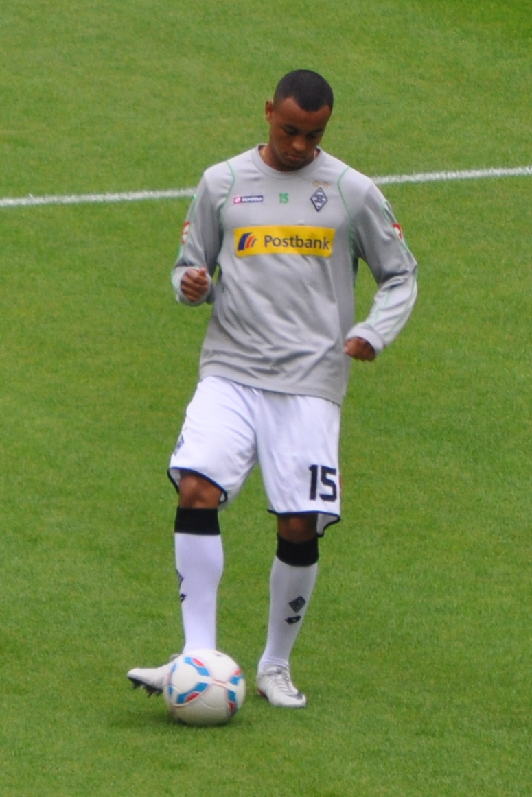 Joshua King vor dem Spiel gegen den VfB Stuttgart